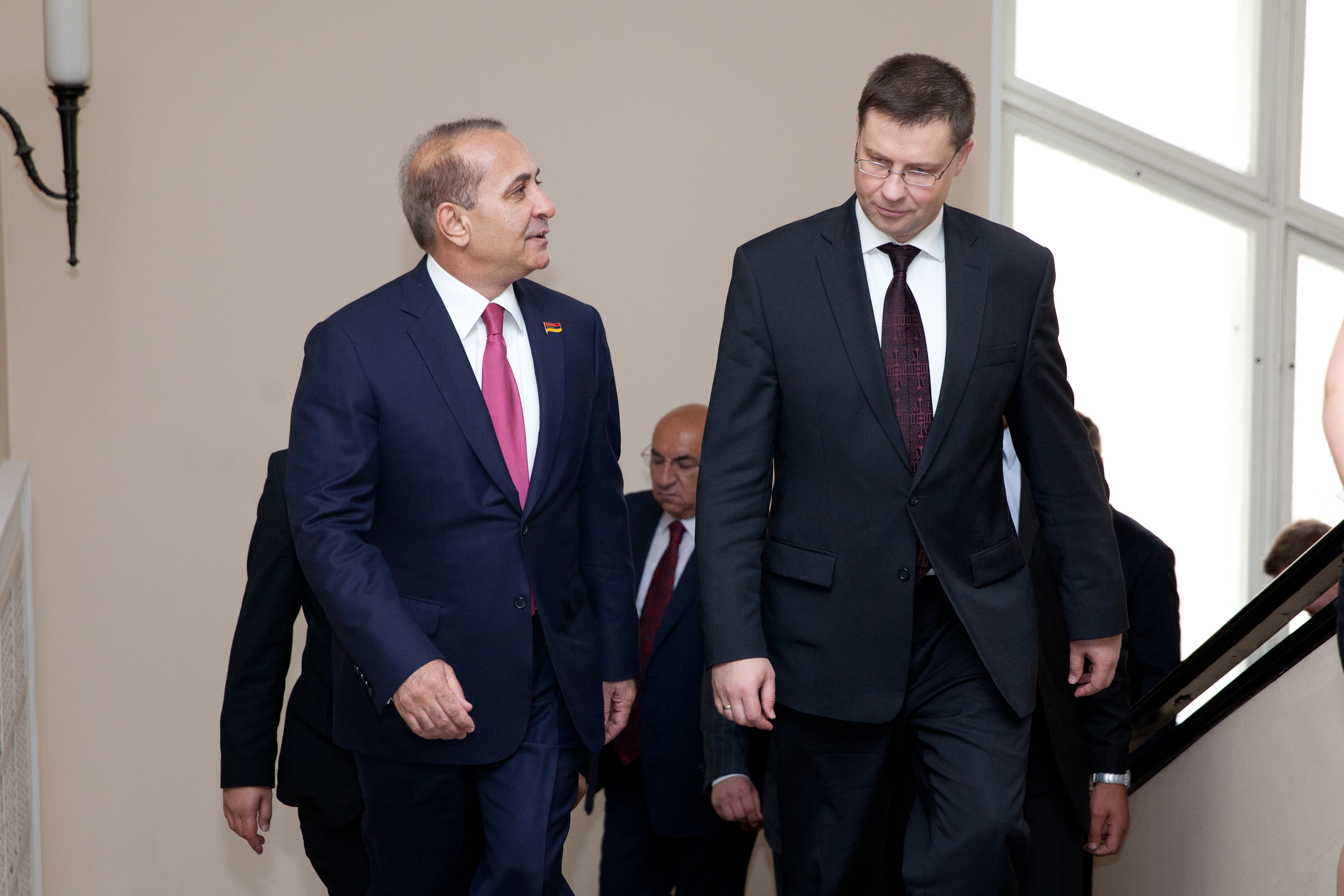 Foto: Toms Norde, Valsts kanceleja